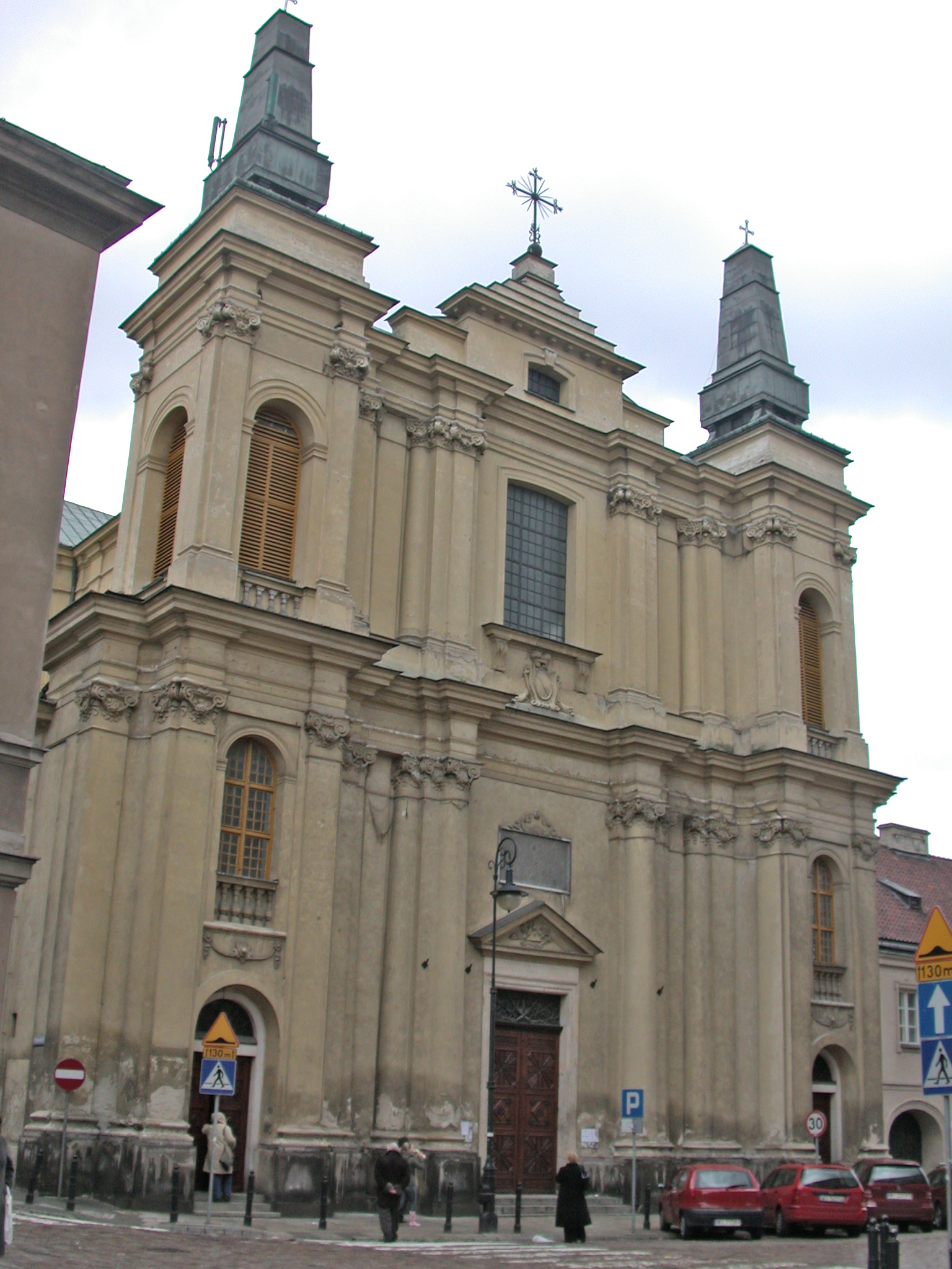 Varsavia, chiesa di San Francesco (kóściół Św. Franciszka), nella Città Nuova (Nowego Miasta).